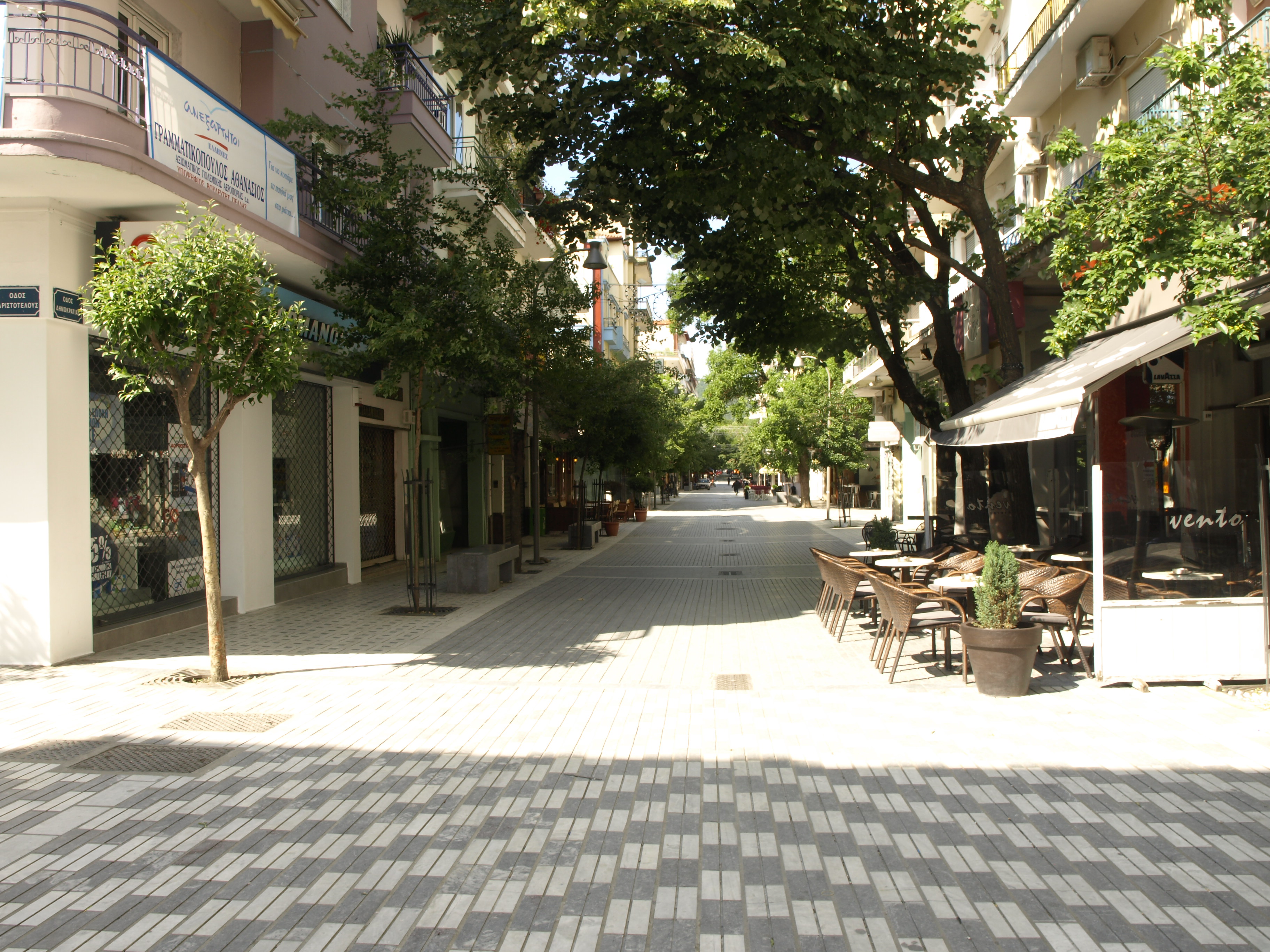 l'isola pedonale